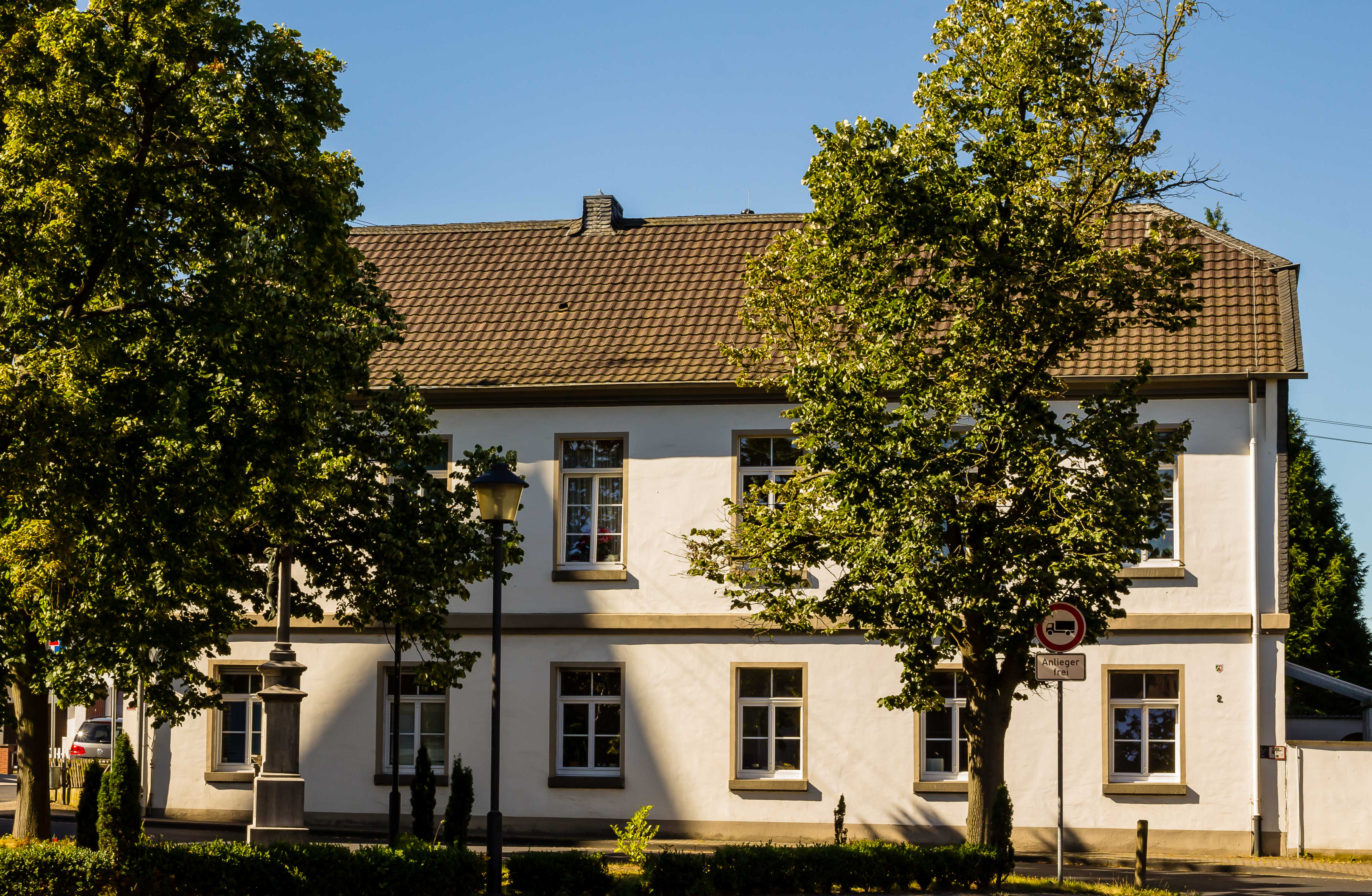 Pfarrhaus / Alte Schule Swisttal-Miel This image shows a heritage building in Germany, located in the North Rhine-Westphalian municipality Swisttal (no. 12 (Miel)).